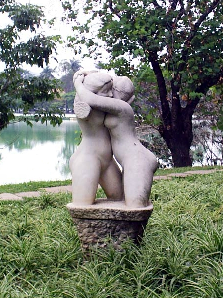 O Abraço, escultura de Alfredo Ceschiatti, Museu de Arte da Pampulha, Belo Horizonte. Autor: Cid Costa Neto. Data: 23/OCT/2005